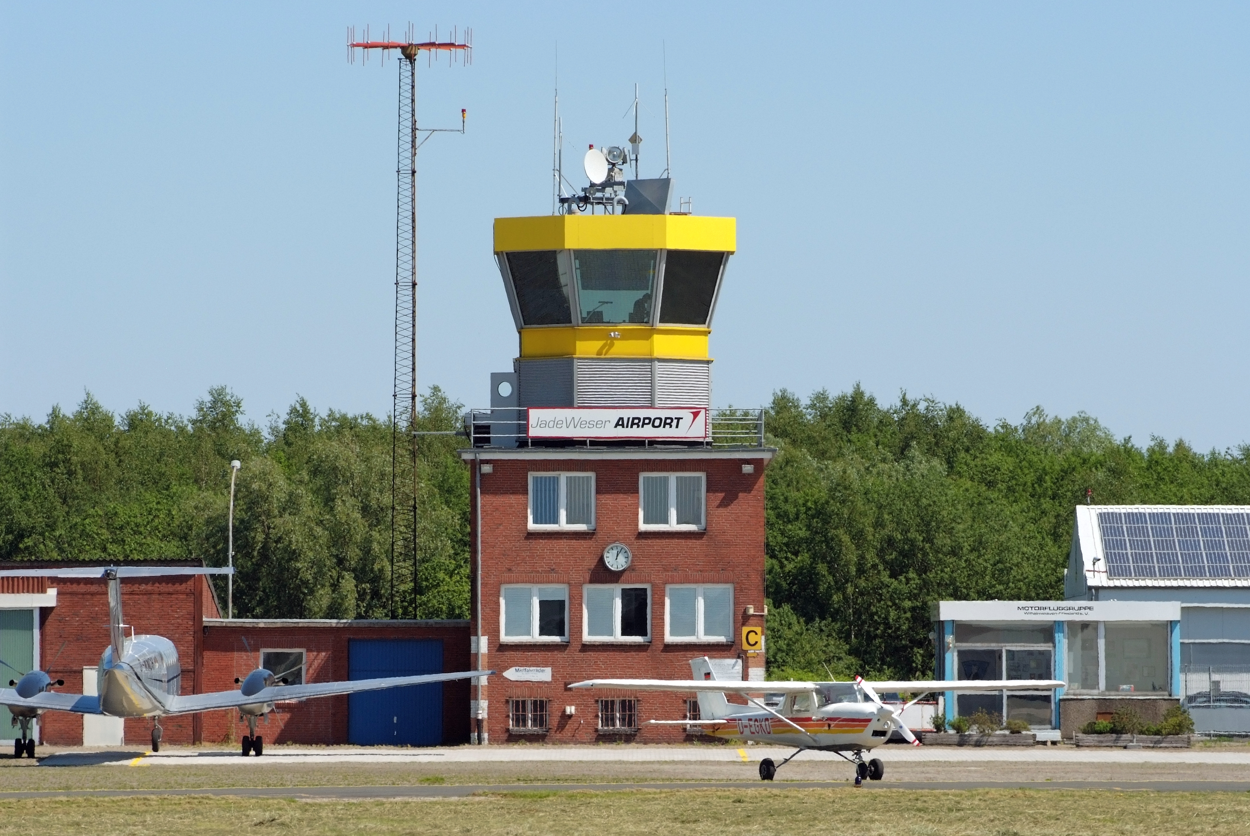 Fotoflug vom Flugplatz Nordholz-Spieka über Cuxhaven und Wilhelmshaven